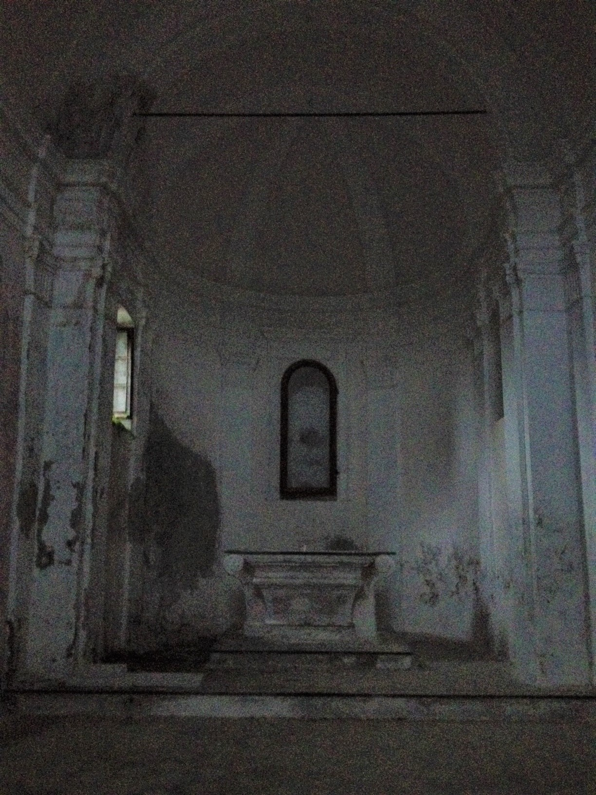 Interno oratorio di san sebastiano, Calvisio Vecchia, Finale Ligure - SV - Italy